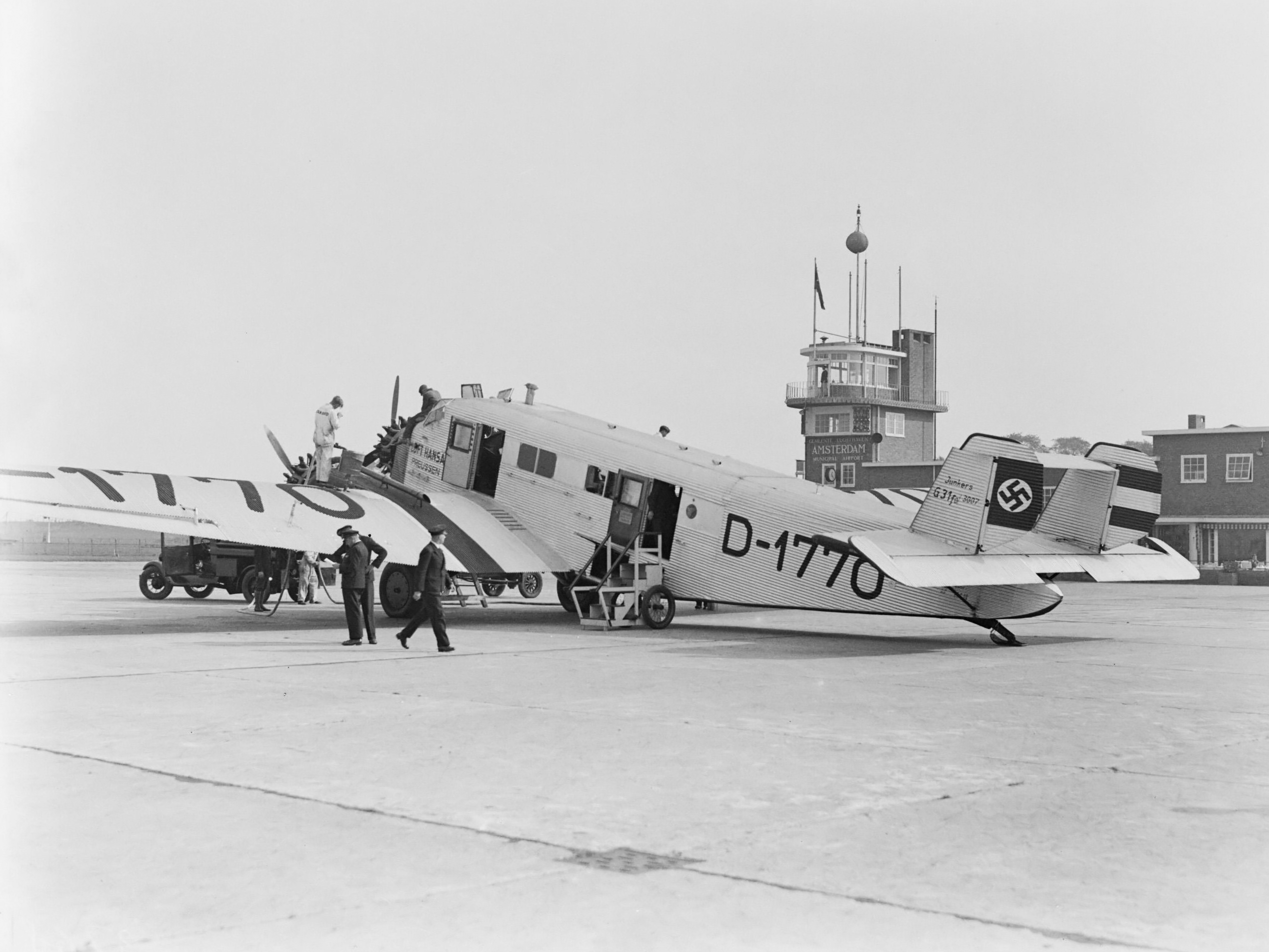 Junkers G 31 D-1770 Preussen van Lufthansa met een hakenkruis op de staart op Schiphol 1933